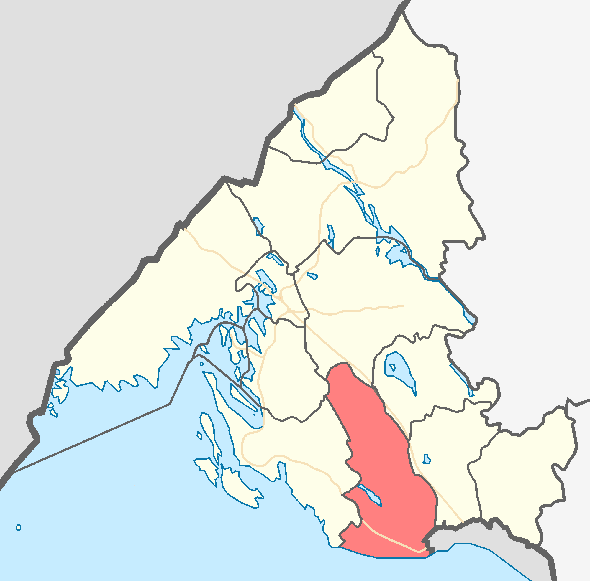 МО Полянское сельское поселение на карте Выборгского района Ленинградской области